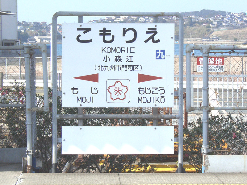 JR鹿児島本線小森江駅 小森江の桜をイメージしたイラストの描かれた駅名標